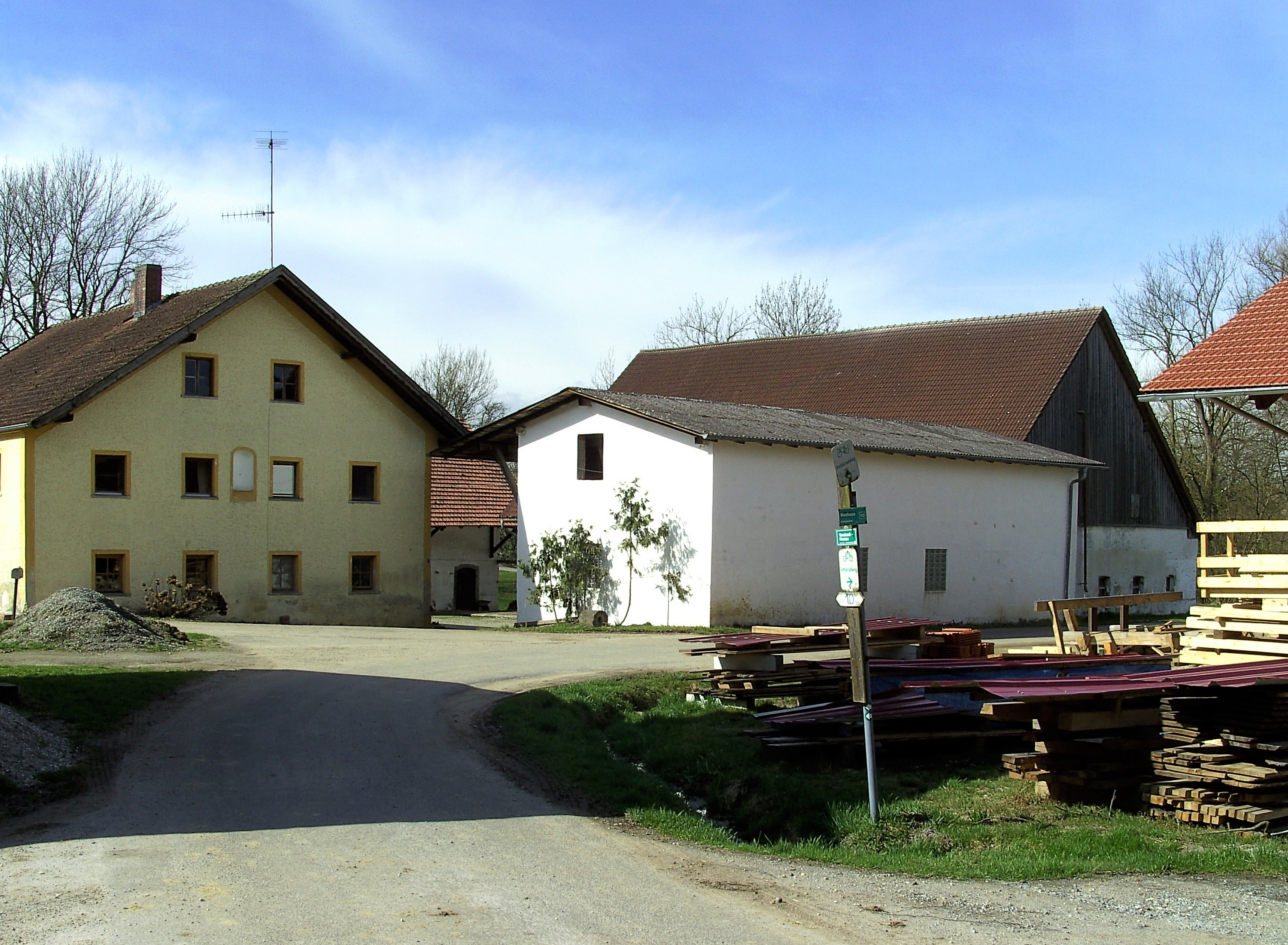 Das Dorf Niederschärding nahe dem Inn an der deutsch-österreichischen Grenze im Landkreis Passau.